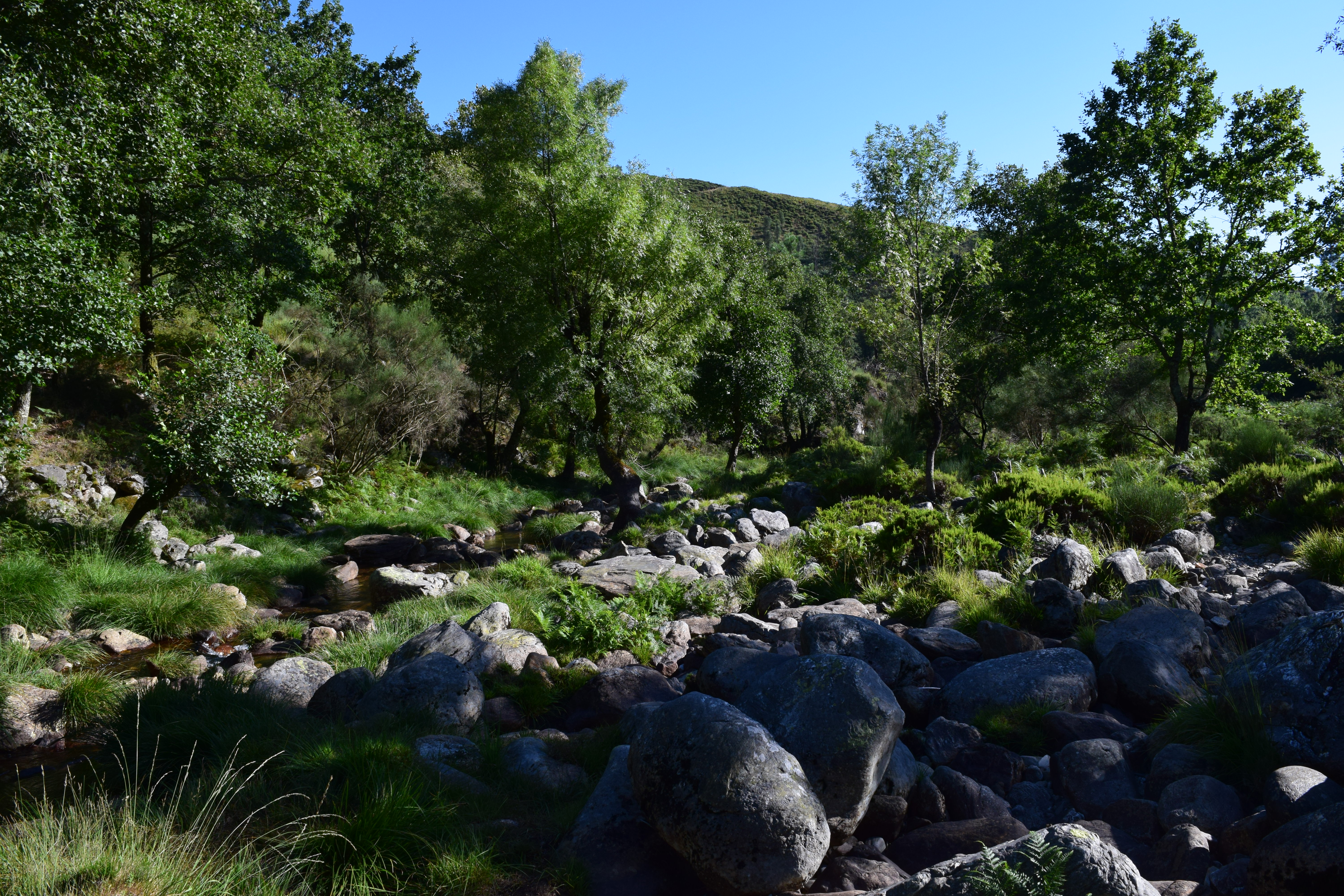 Parque Natural do Alvão This is a photography of a Site of Community Importance in Portugal with the ID: PTCON0003. Natura2000 entry, EEA entry